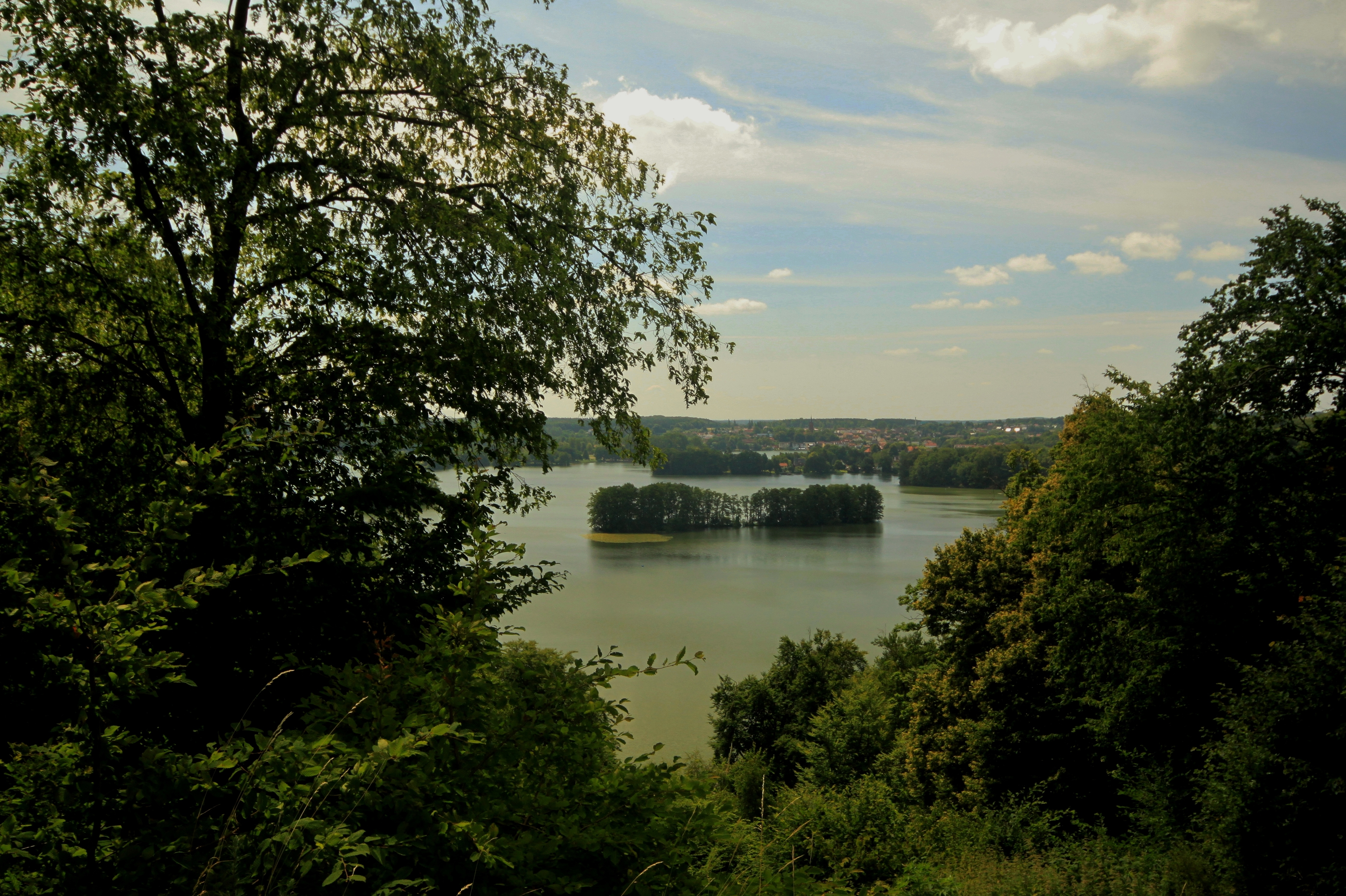 Nationaler Geotop - Feldberger Seen - Blick vom Reiherberg zum Haussee